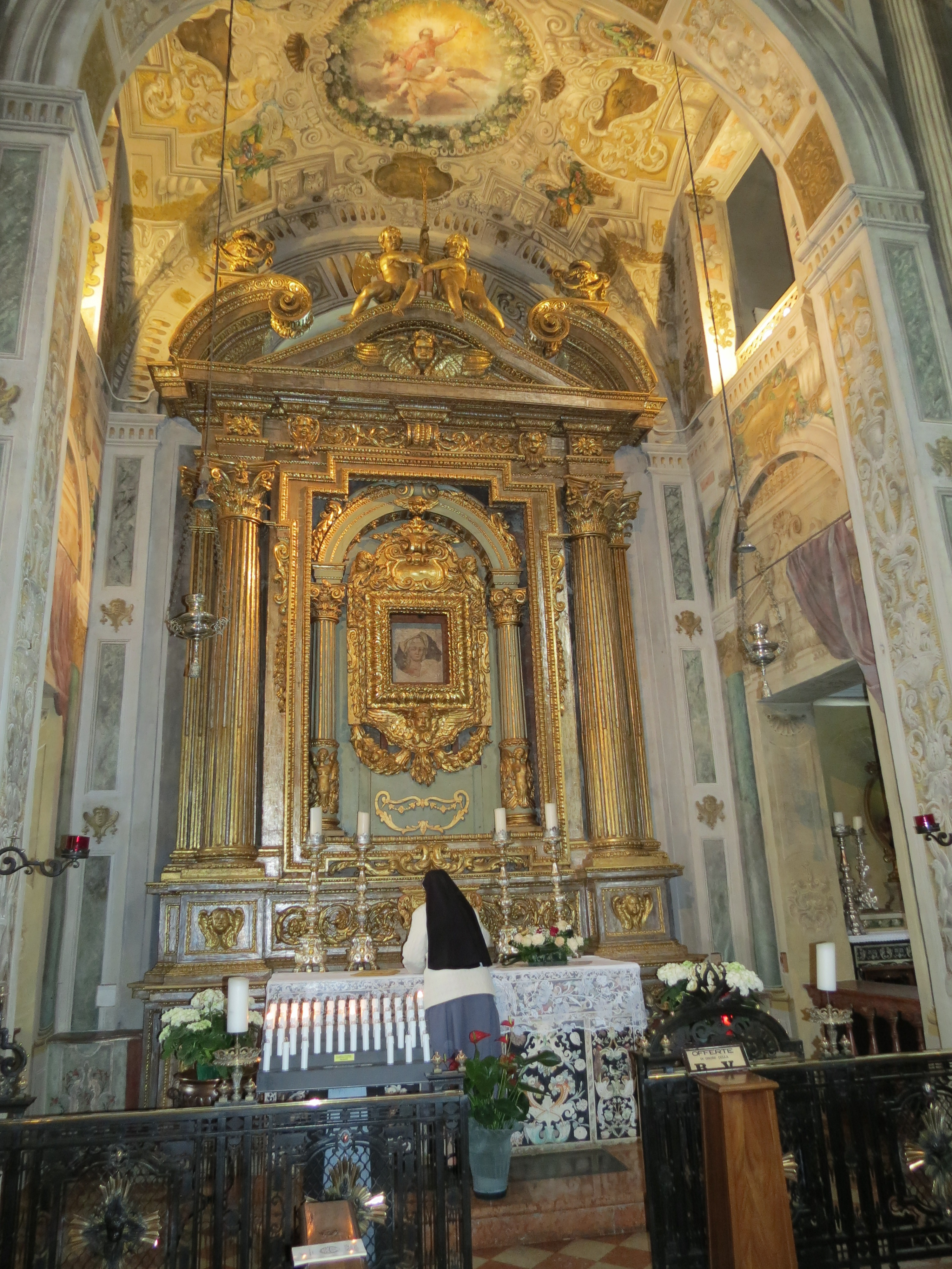 Altare Interno alla Chiesa di San Francesco